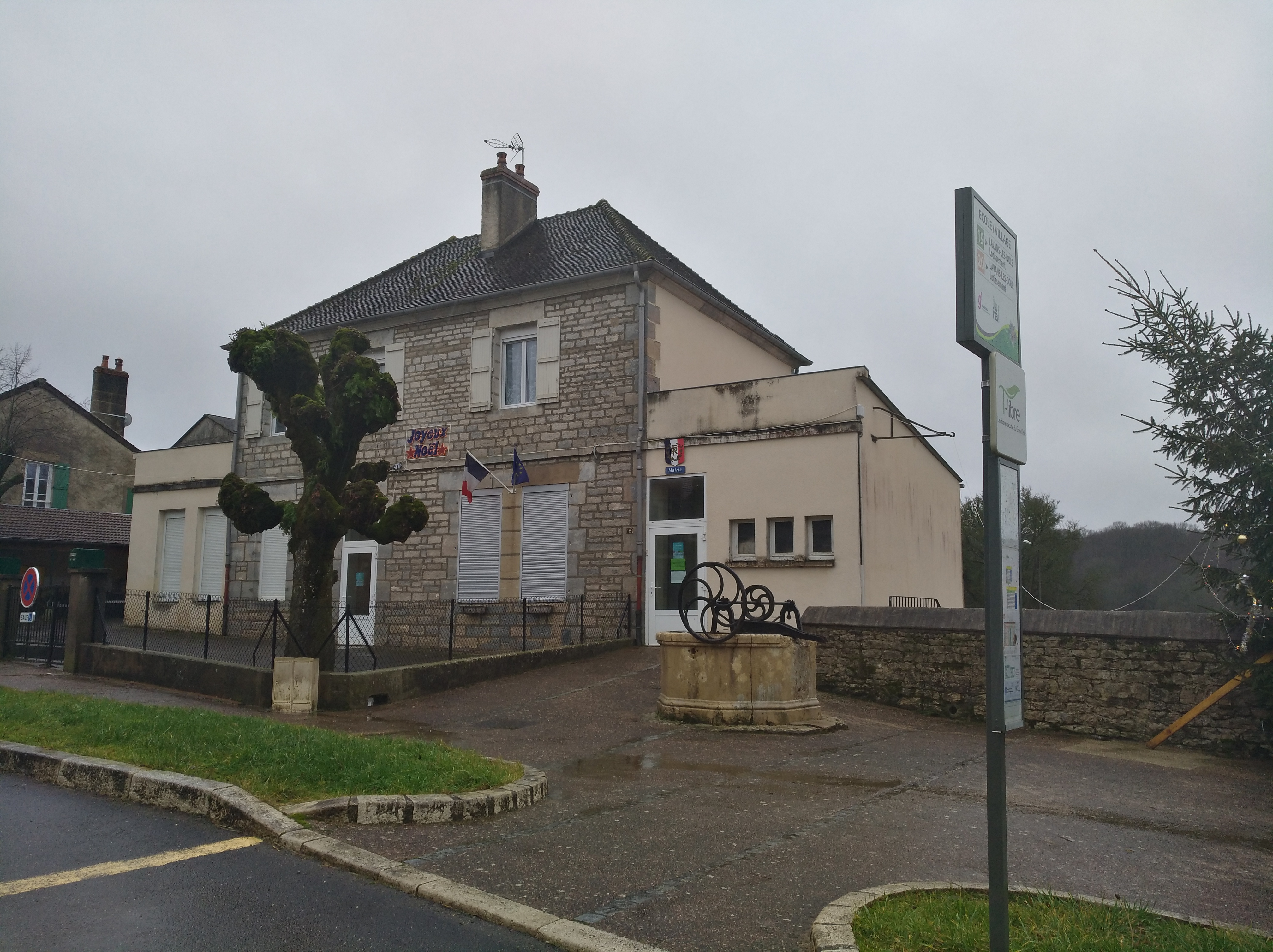 Lavangeot (Jura, France) en janvier 2018.